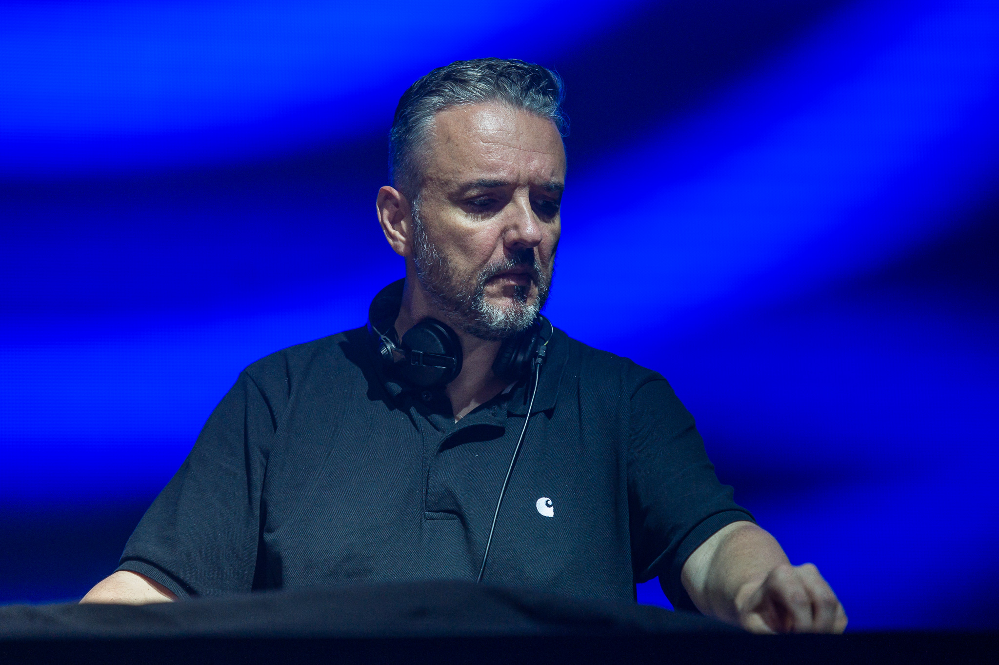 Deichbrand,ESK Events & Promotion GmbH,Electric Island Stage,Festival,Konzert,Livekonzert,Livemusik,Marc Romboy,Sea-Airport Cuxhaven/Nordholz,See-Flughafen Cuxhaven/Nordholz,Seeflughafen Cuxhaven/Nordholz